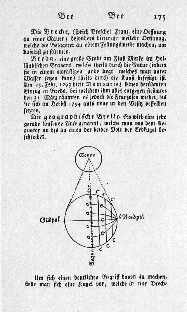 Beispielseite mit Illustration aus Löbels und Frankes "Conversationslexikon" von 1796